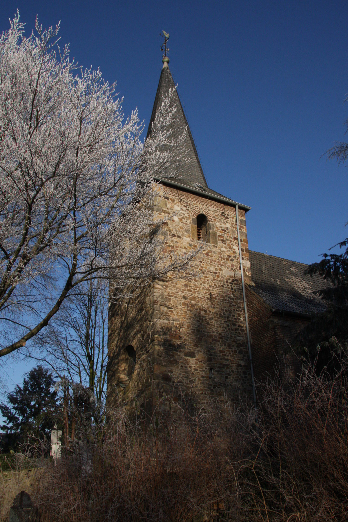 St. Willibrord, Würselen, Ortsteil Euchen